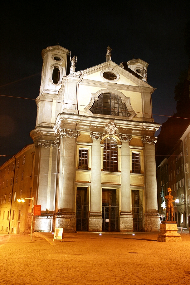 ehem. Ursulinenkirche, Markuskirche